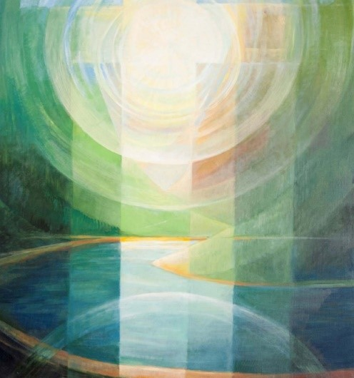 LÁTOMÁS (130x120 cm, olaj, vászon) Felesége a műről: A látomás, a művész utolsó befejezett alkotása, amely akarata ellenére lezárja életművét. A festmény tartalmát jól kifejező formák, az erőteljesebb, de finom színek és fénysugarak – keret motívumként való megjelenítése csodálatos „látomás” érzetét kelti és az öröm érzés mellett, már-már a misztikum és a hitvallás is benne rejlik.